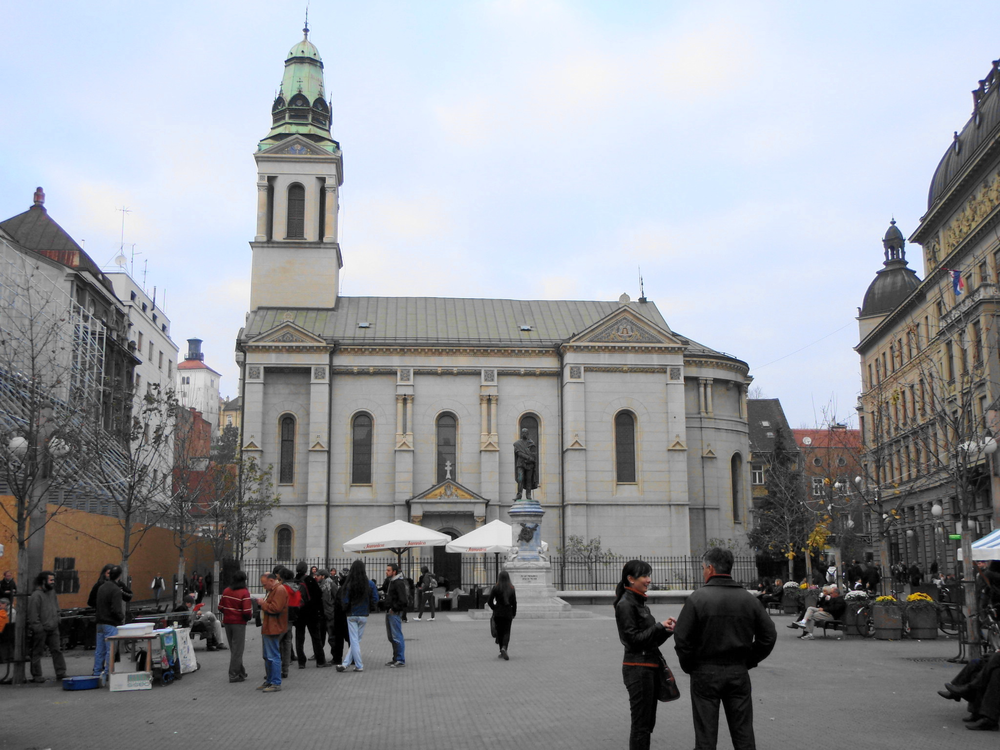 Православна црква у Загребу.